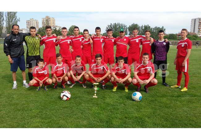 Цветан Спасов с първата му титла като футболист на Бдин Видин .